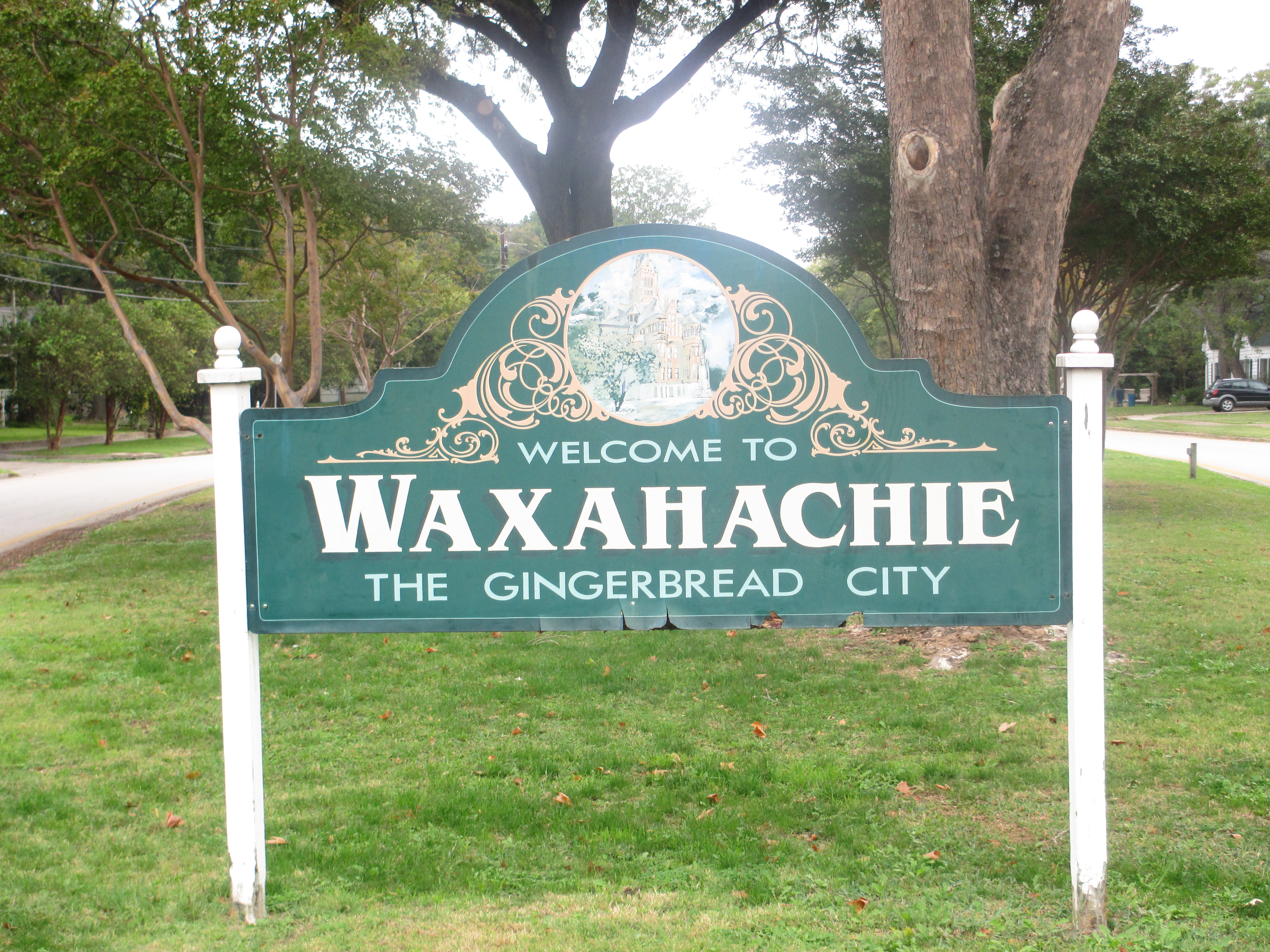 Waxahachie, TX, welcome sign